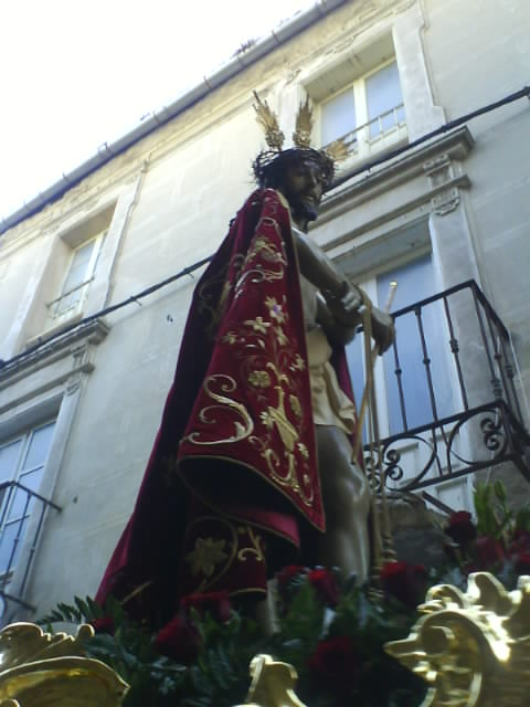 Cristo de la Humildad de Úbeda procesionando por la calle Montiel el Jueves Santo de 2009